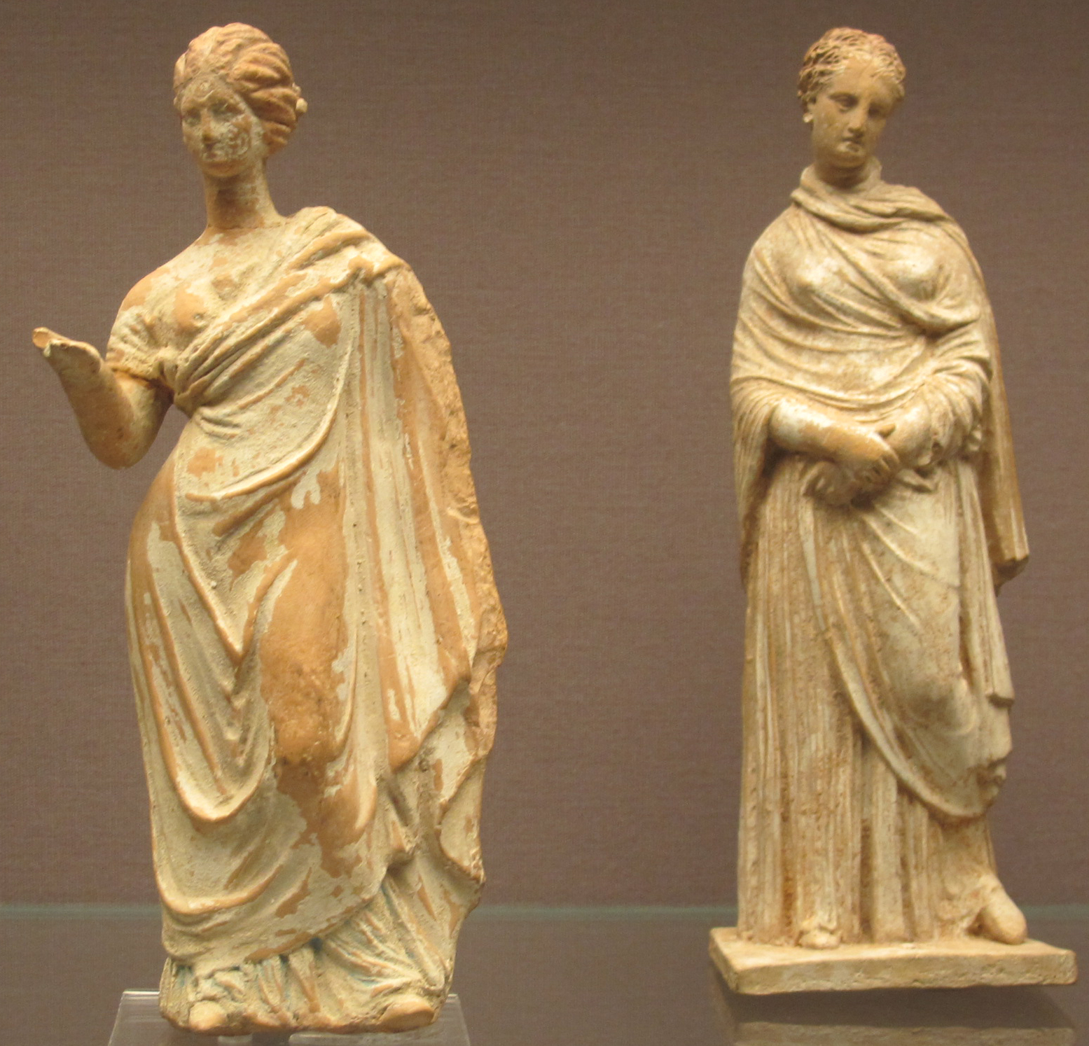 Tanagra o corinto, figurine di donna, 275-250 ac. (left) e 300-275 ac. (right)